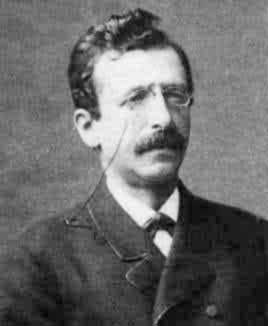 Foto di Jacob Rosanes